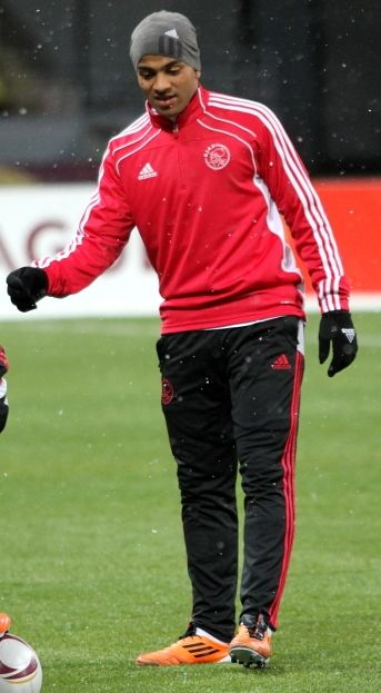 Lorenzo Ebecilio